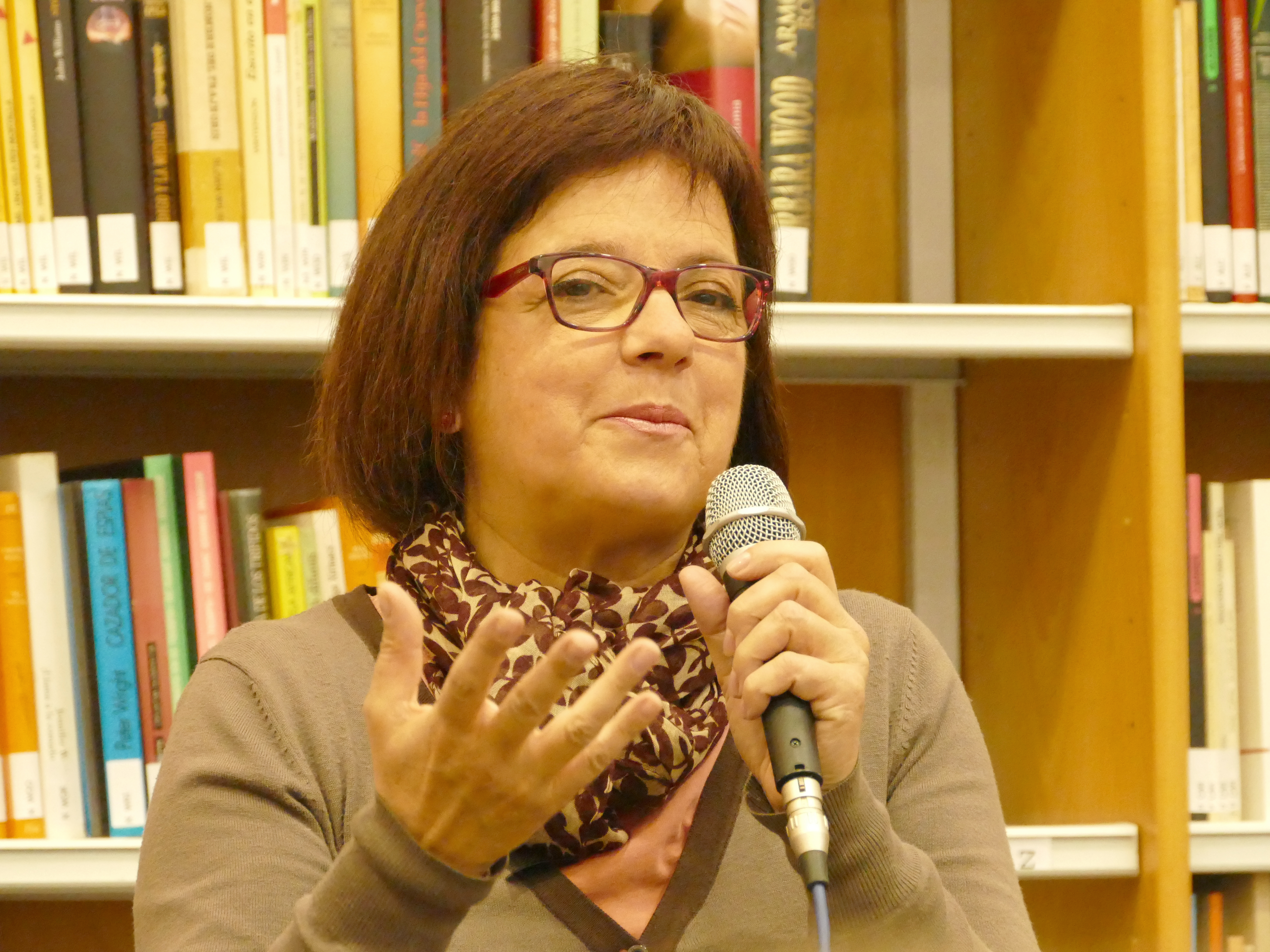 Escriptora Blanca Busquets i Oliu durant la seva visita a Lliçà de Vall